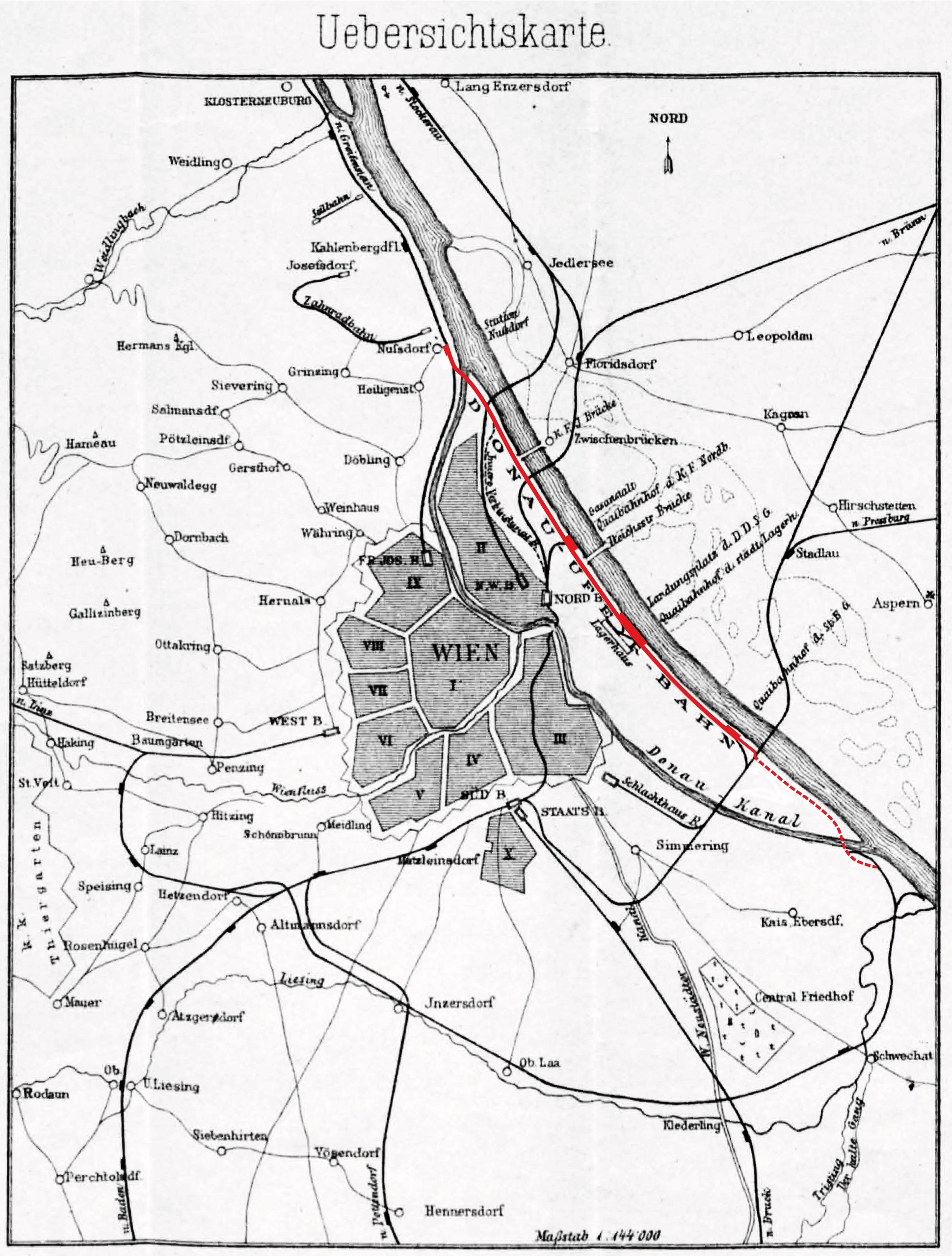 Wien, Bahnanlagen, Uebersichtskarte, Donauuferbahn